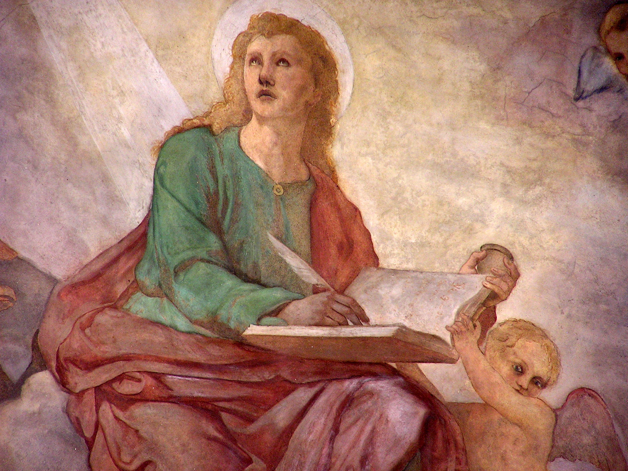 la foto raffigura un particolare di un affresco eseguito da Francesco Podesti sulle vele della cupola della Chiesa del SS. Sacramento, ad Ancona. Il dipinto rappresenta San Giovanni Evangelista. Nelle altre tre vele della cupola F. Podesti dipinse gli altri tre evangelisti. Il pittore al momento di eseguire questi affreschi aveva più di ottanta anni e perciò essi possono essere considerati come il suo testamento artistico.